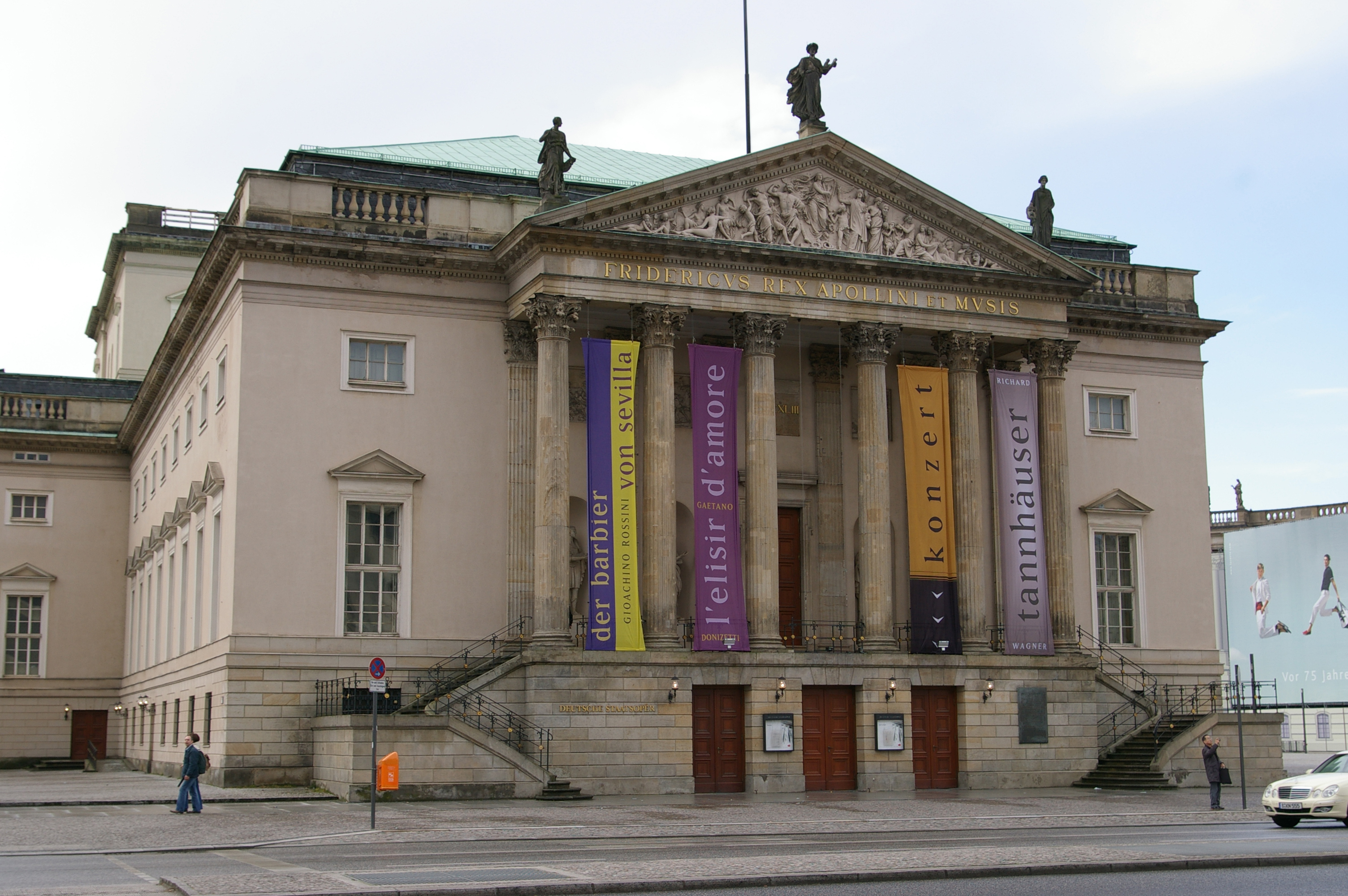 Staatsoper Berlin